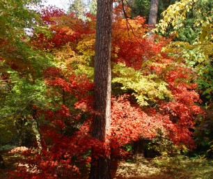 Przebarwiające się klony w Arboretum w Rogowie.